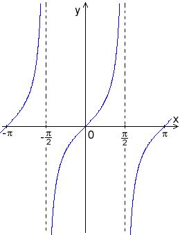 Graf funkce tangens.